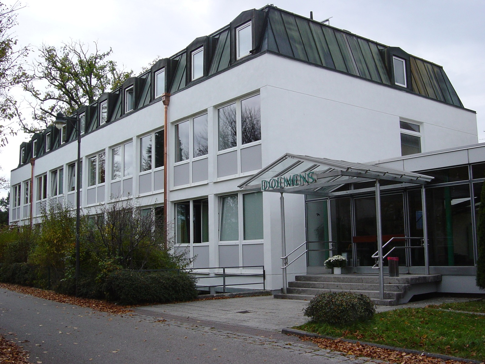 Doemens, Fachakademie für Brauwesen und Getränketechnik und Fachschule für Braumeister, Schmidbauerstraße, Gräfelfing